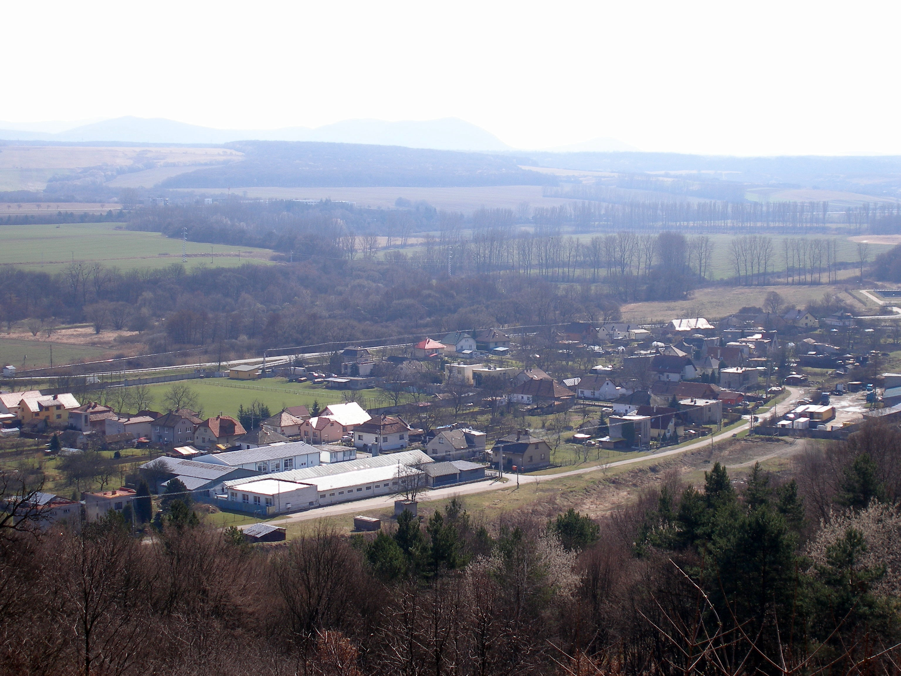 Obec Haniska okres Prešov.